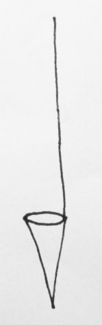 Gräddtjuv, gräddtjuv (utensil for skimming the cream off the milk in bottles)